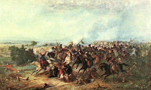 Izgonirea turcilor la Calugareni